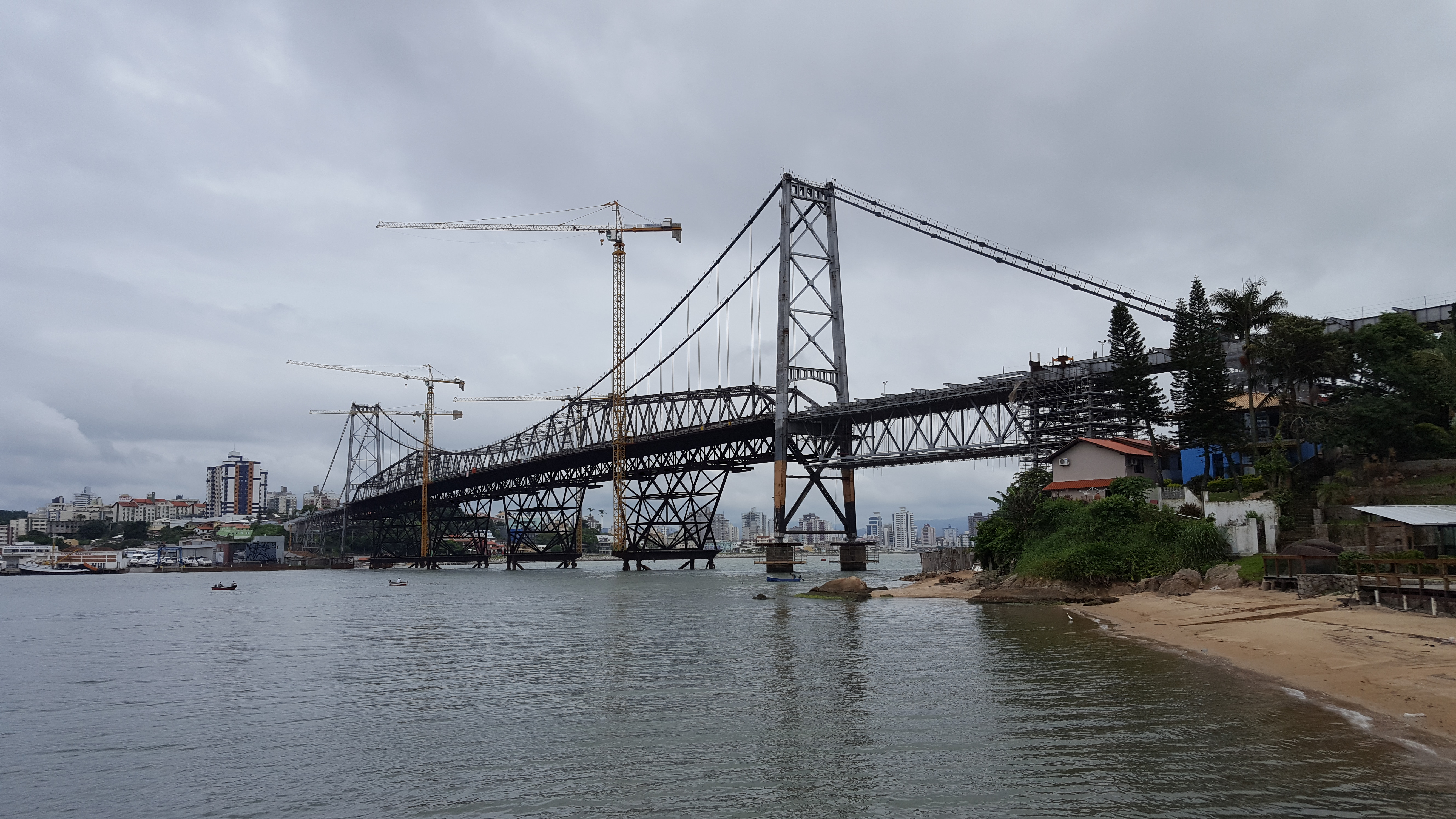 Ponte Hercílio Luz em reforma, na manhã seguinte à suspensão do vão central por guindastes.